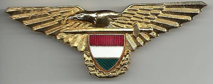 Magyar Légierő - Aranykoszorús I. osztályú repülőgépvezető